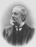 Prefetto, commendatore della corona d'Italia